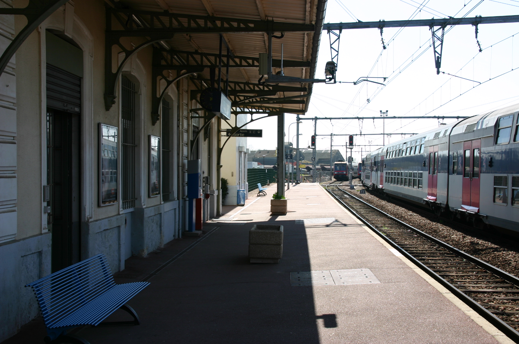 Gare de Malesherbes, Loiret (France)